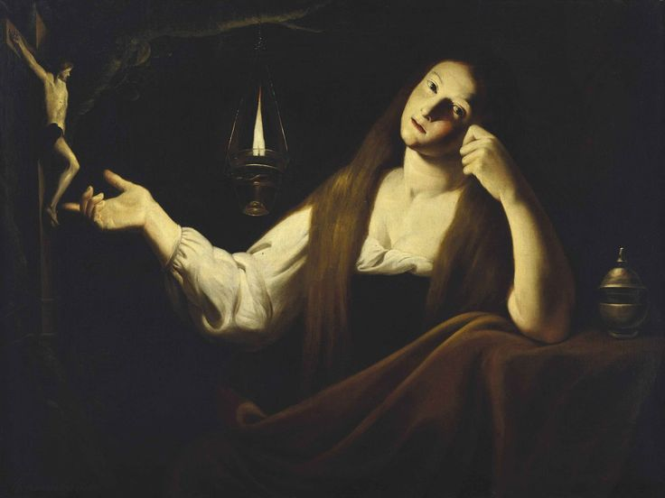 The Candlelight Master. The Penitent Magdalene, oil on canvas 39 x 51½ in. (99 x 131.4 cm.)